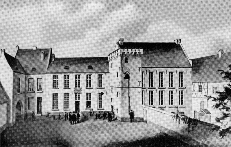 Das ehemalige Schwesternhaus Mariengarten und spätere Schulgebäude des Konrad-Duden-Gymnasiums (1612-1912) vor 1869; Quelle der Zeitangabe: Identisches Bild auf